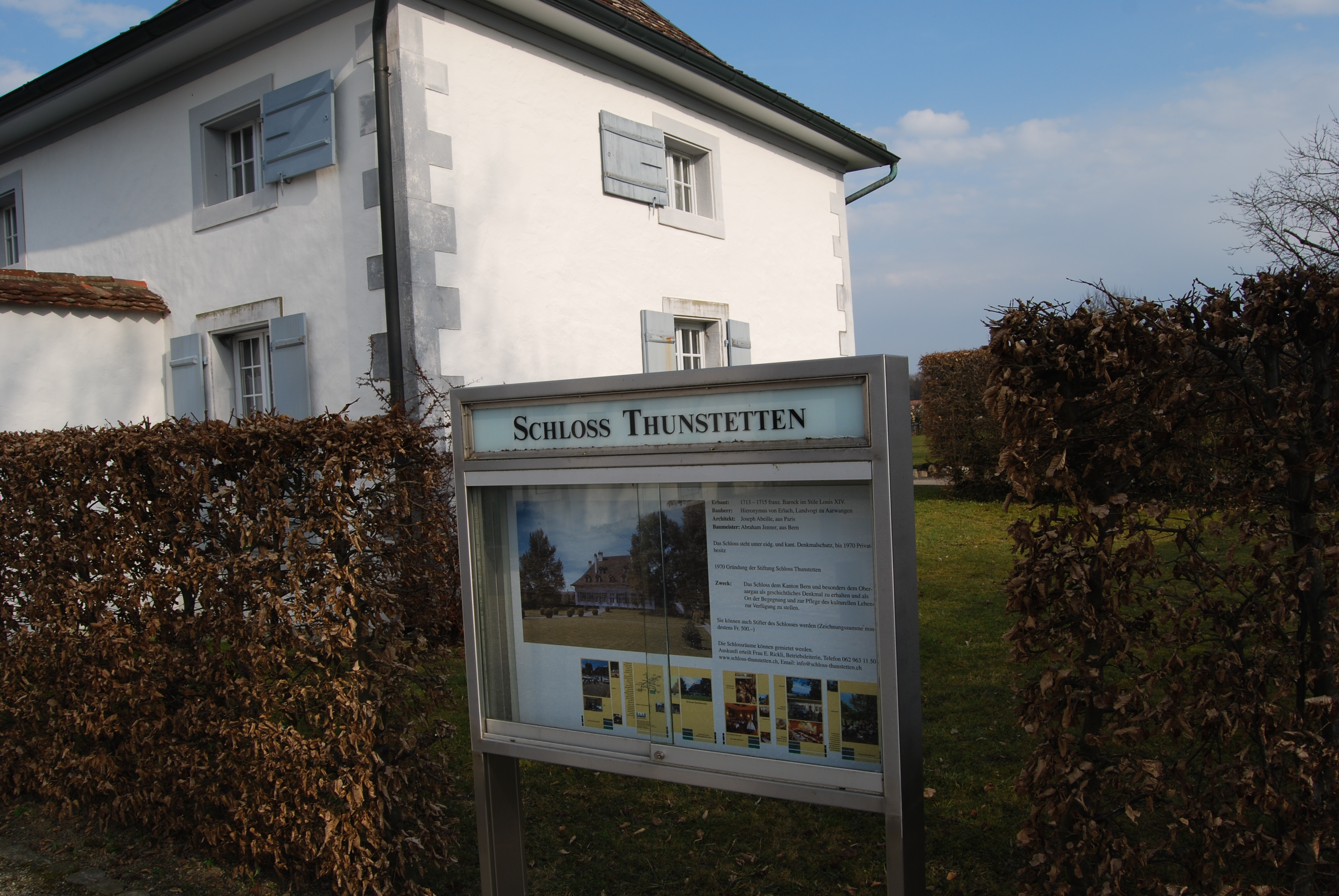 Kastelo Thunstetten, Kantono Berno, Svislando